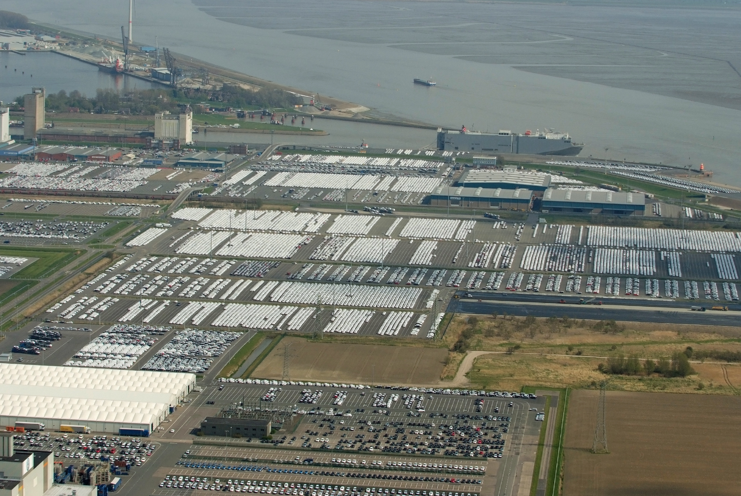 Fotoflug von Nordholz-Spieka nach Oldenburg und Papenburg